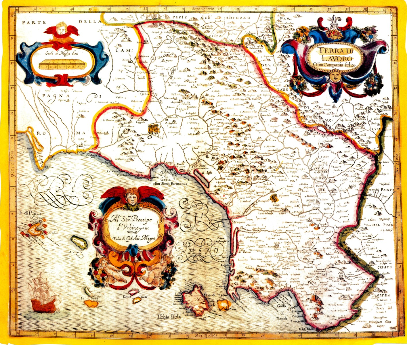 Mappa della Terra di Lavoro